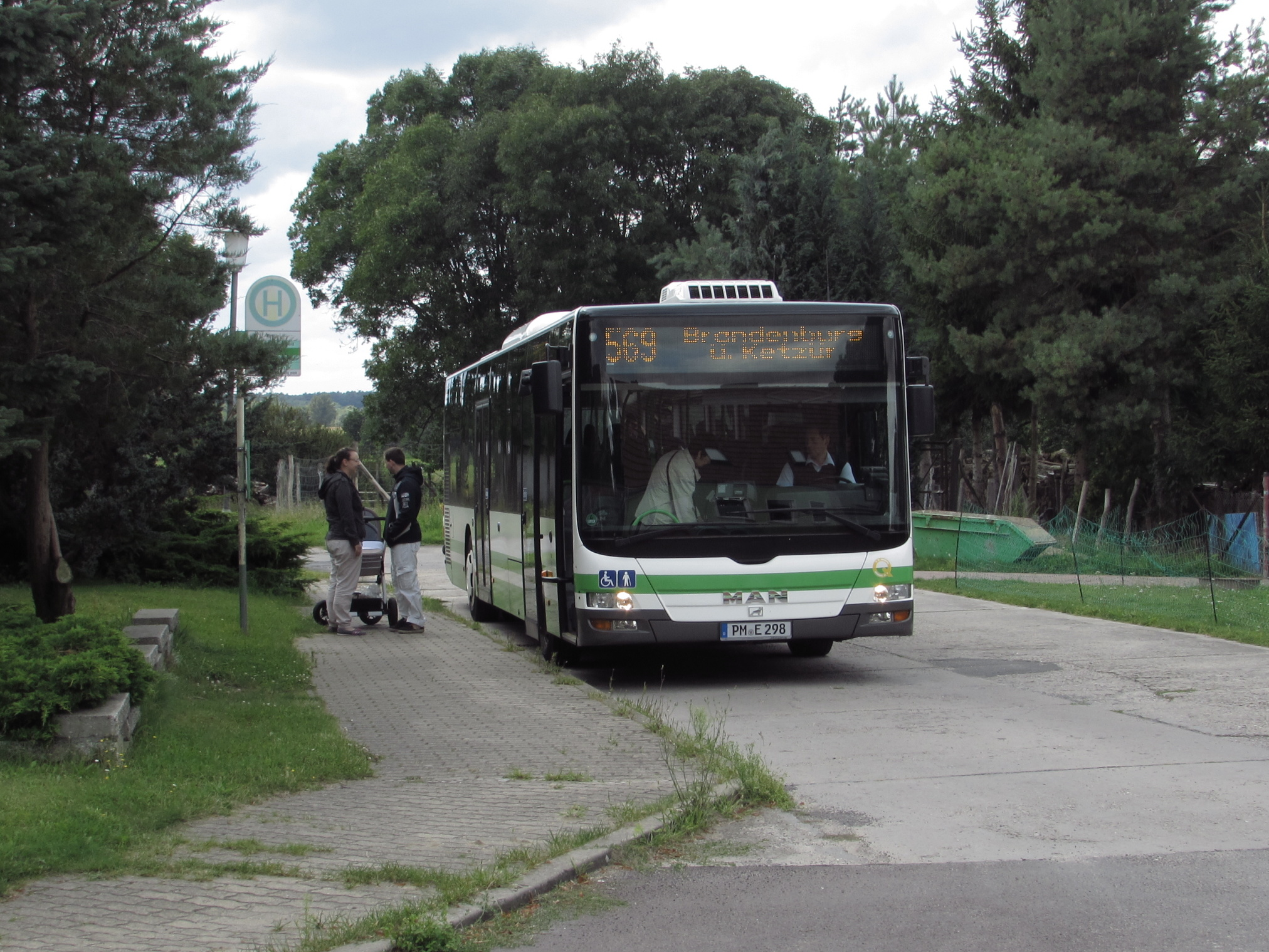 bushaltestelle ketzür